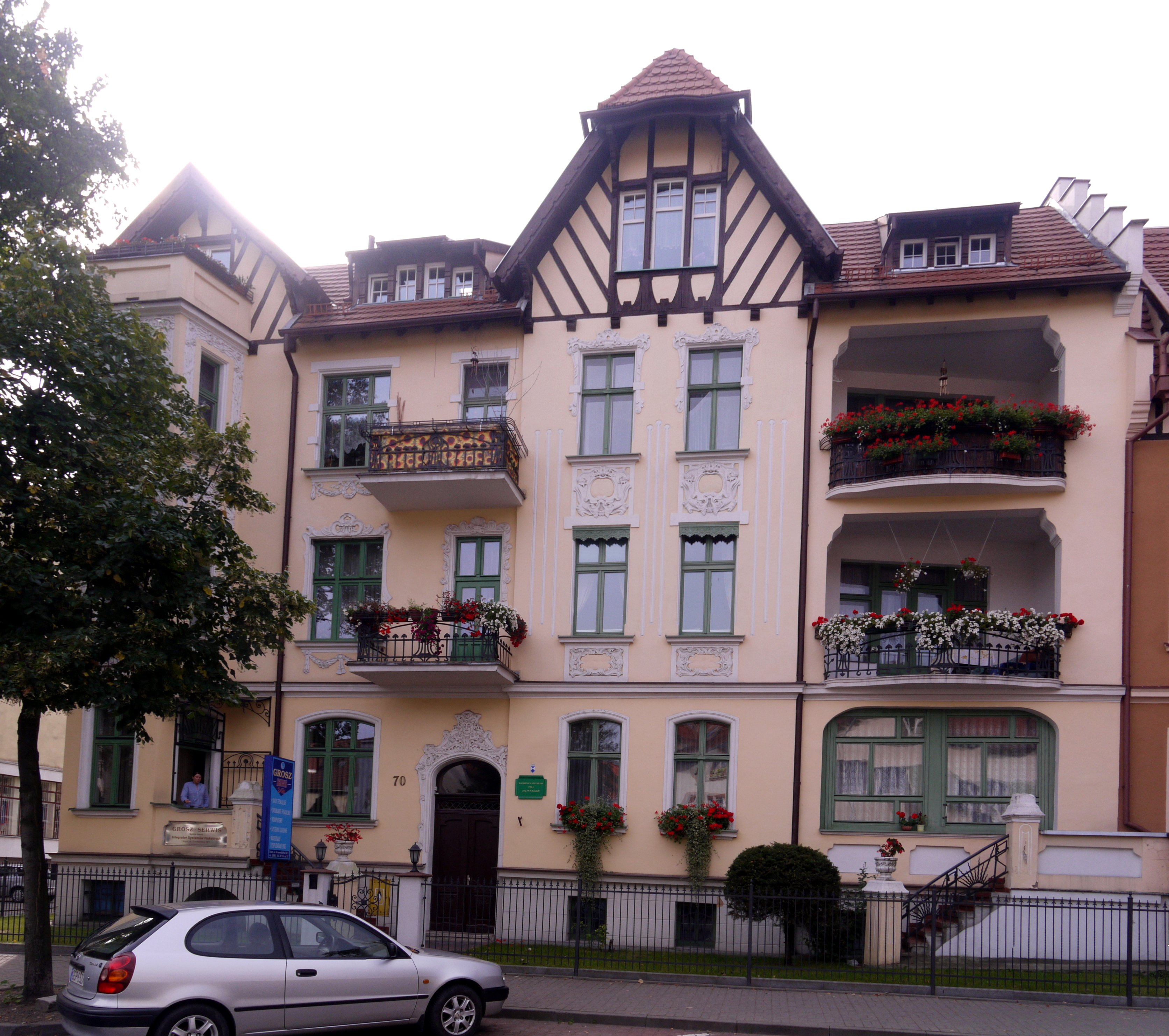 Kamienica secesyjna z 1906 r., proj. W. W. Fenzloff. ul. Grunwaldzka 70, Sopot. Widok od strony wschodniej.